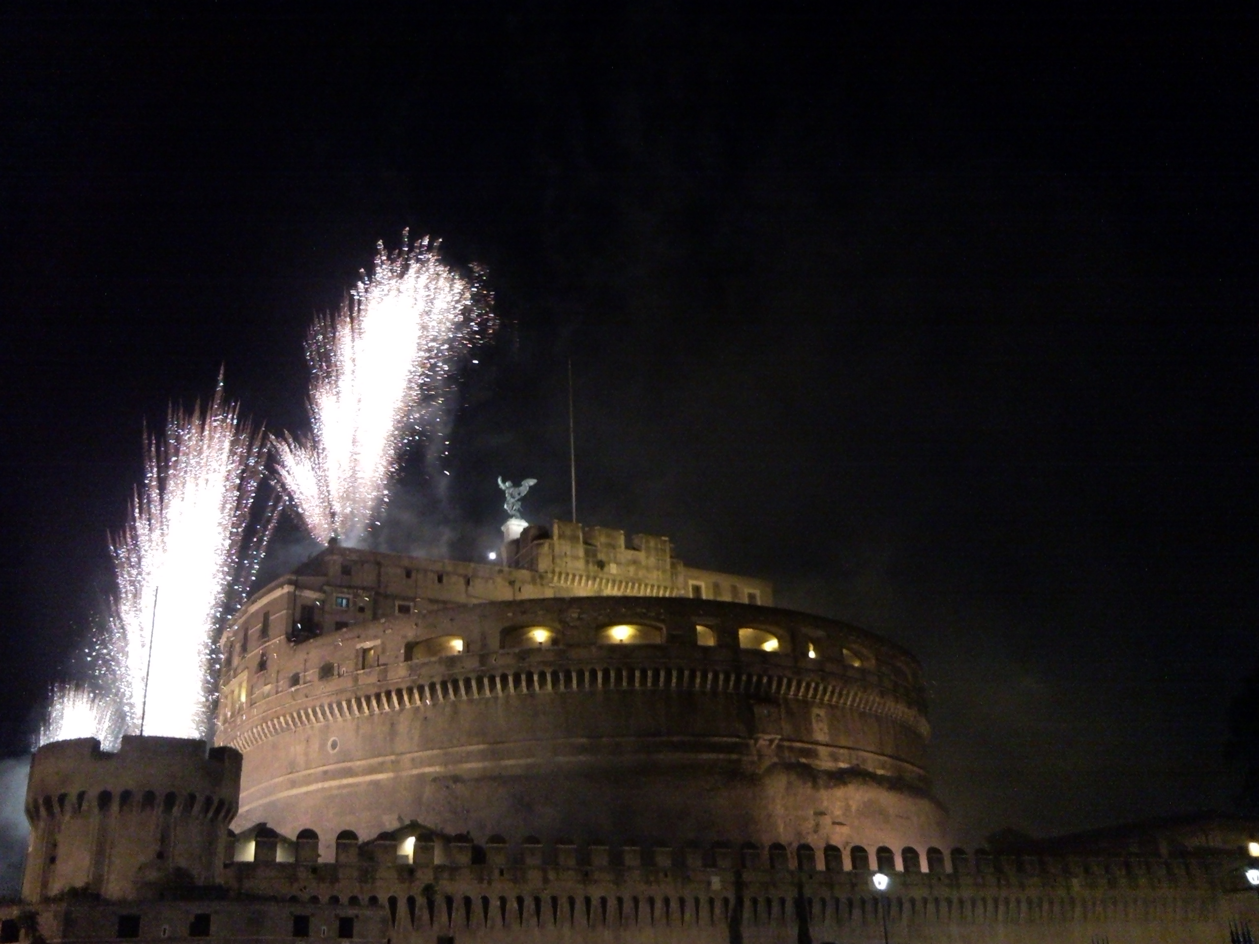 Girandola di Castel Sant'Angelo, Roma (Italia). 28 giugno 2009